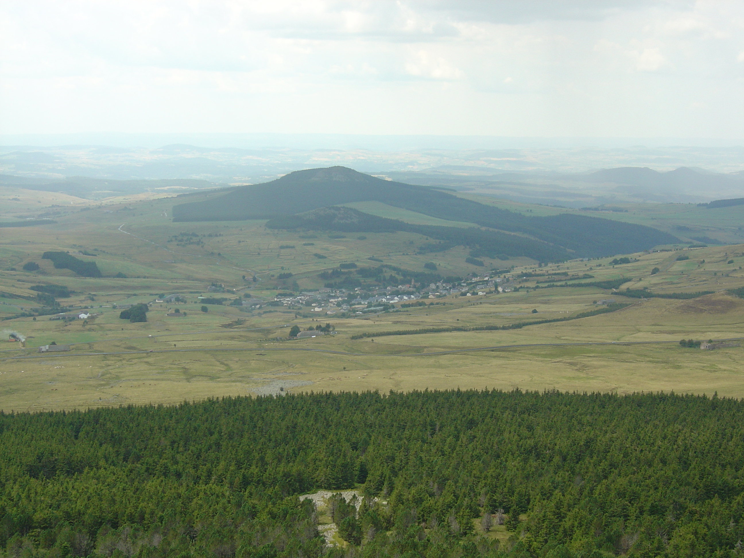 Le village de Les Estables et le Rocher Tourte (1535 m) vus du Mont Mézenc